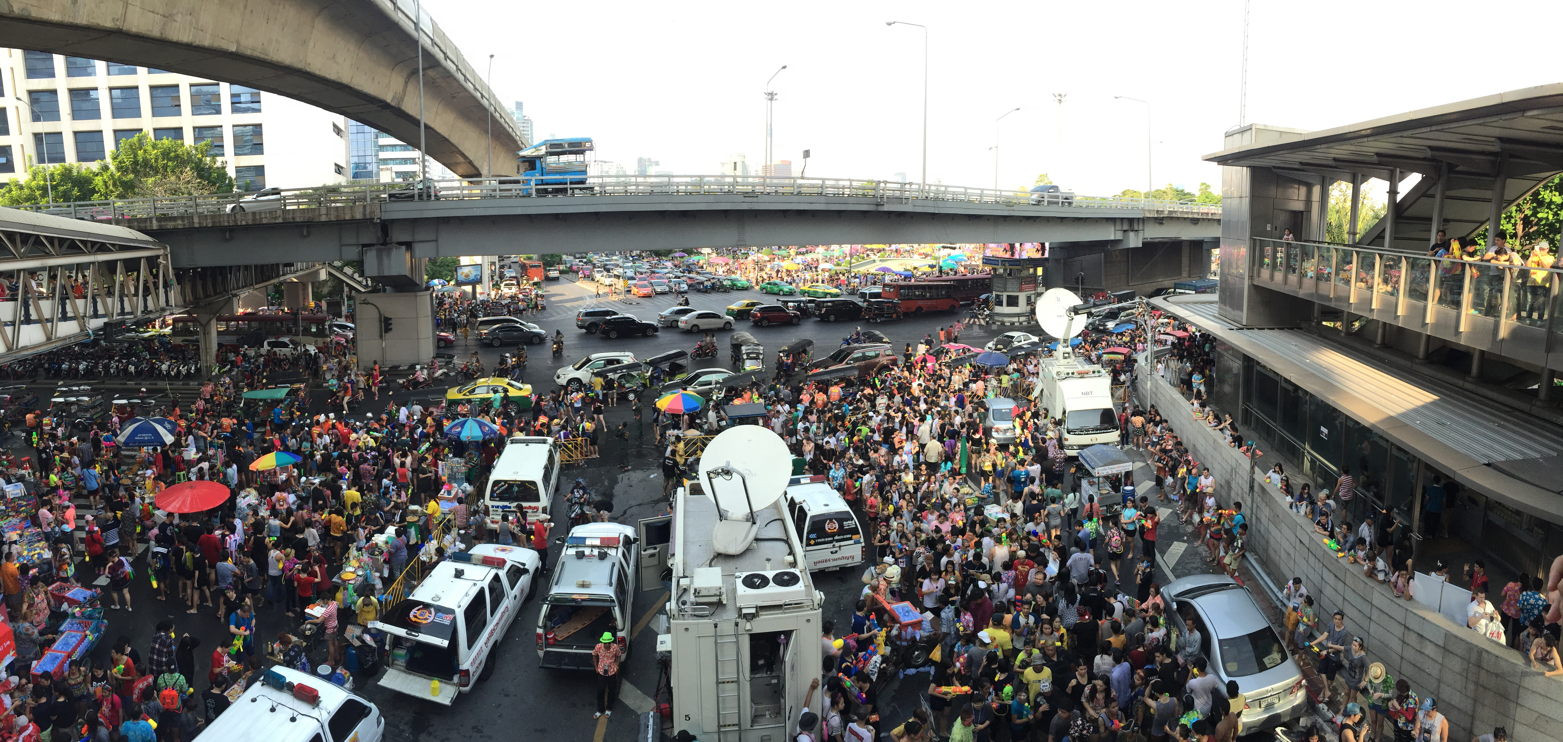 Silom, Bang Rak, Bangkok, Thailand